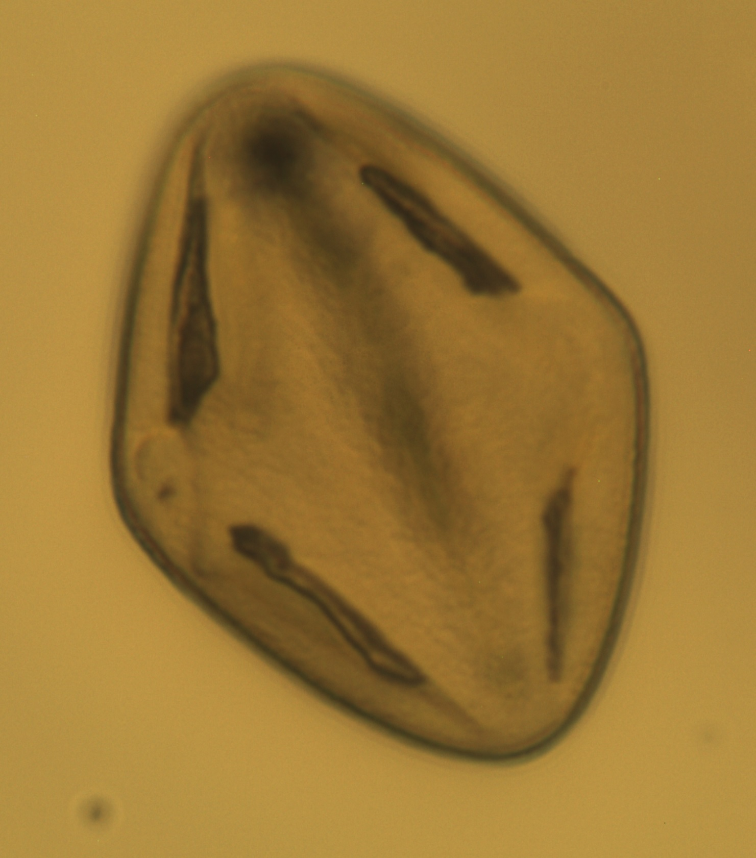 Camellia japonica Pollenkorn 400x in Glycerin